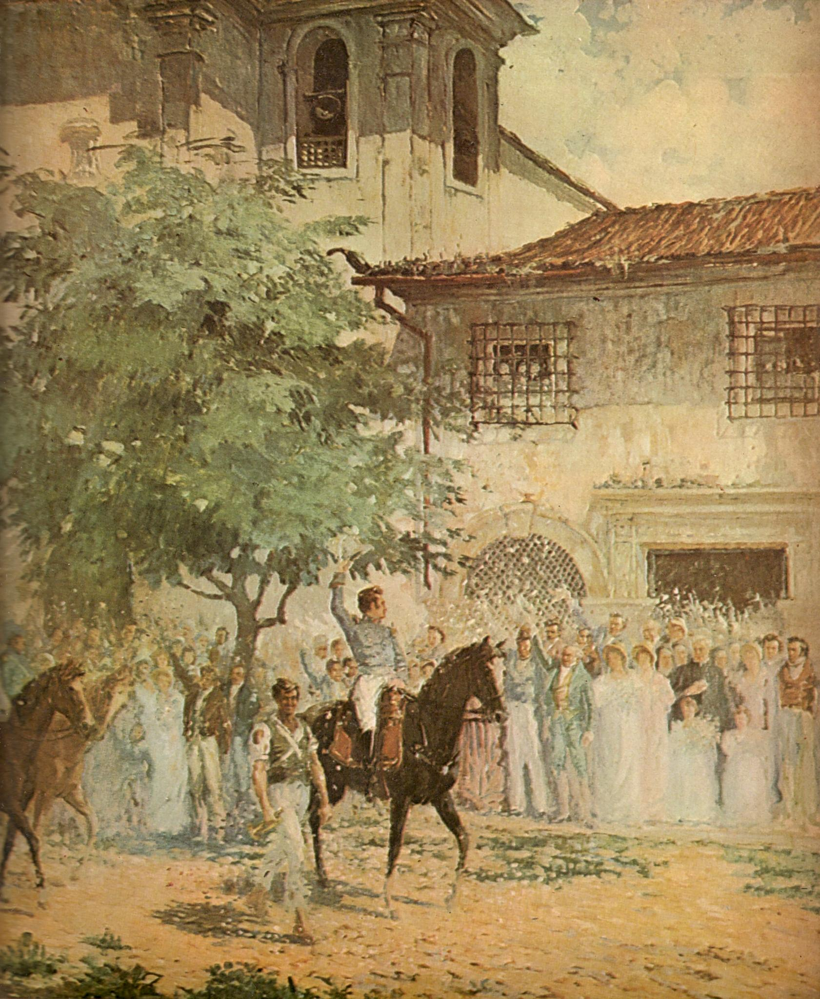 Entrada do Exército Libertador de Prisciliano Silva. Quadro pintado a pedido do então prefeito de Salvador, Francisco de Sousa.[1] Exército brasileiro adentrando Salvador após a rendição das forças portuguesas, 1823.